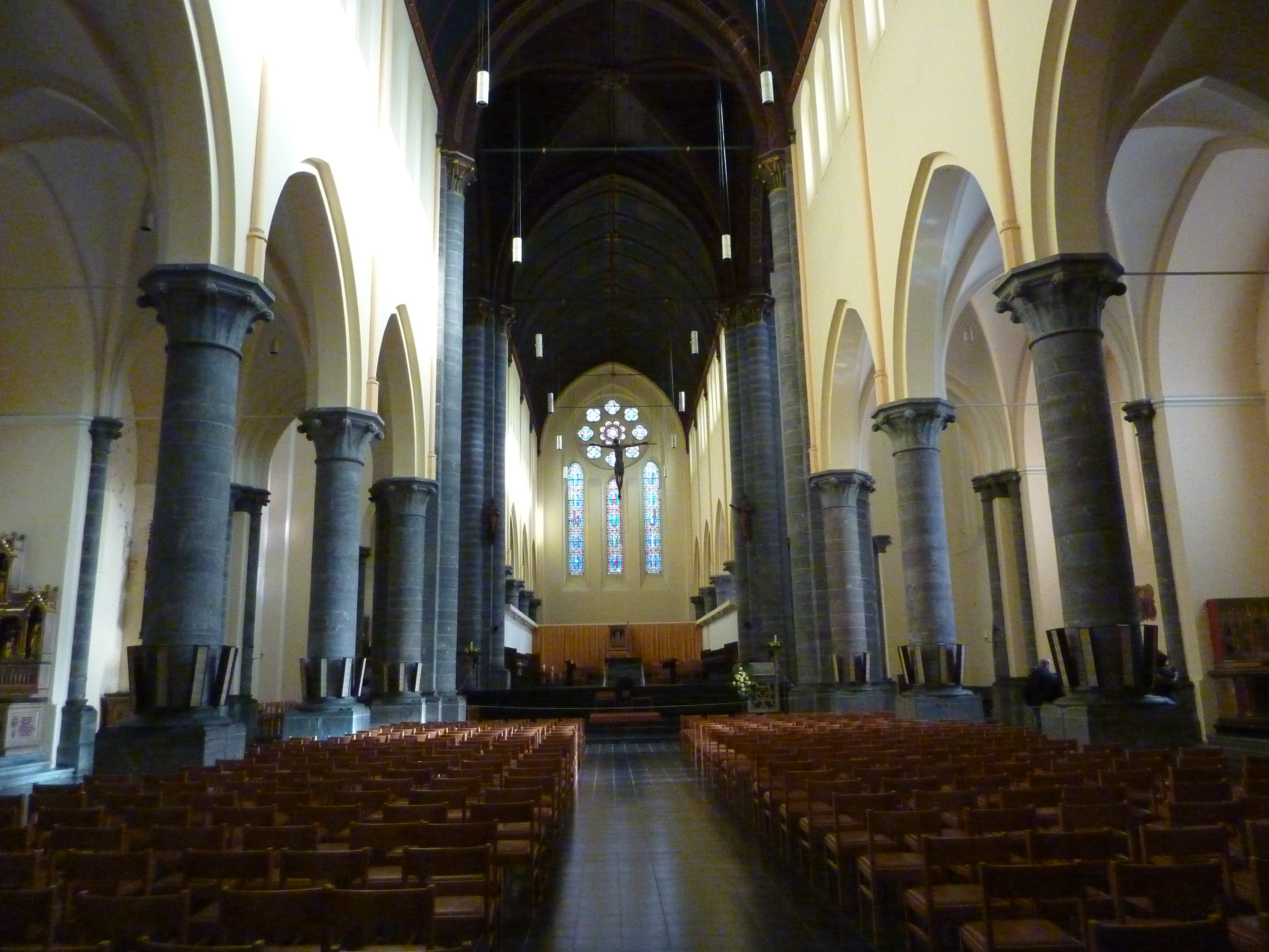 Kerk klooster Maredsous binnenkant